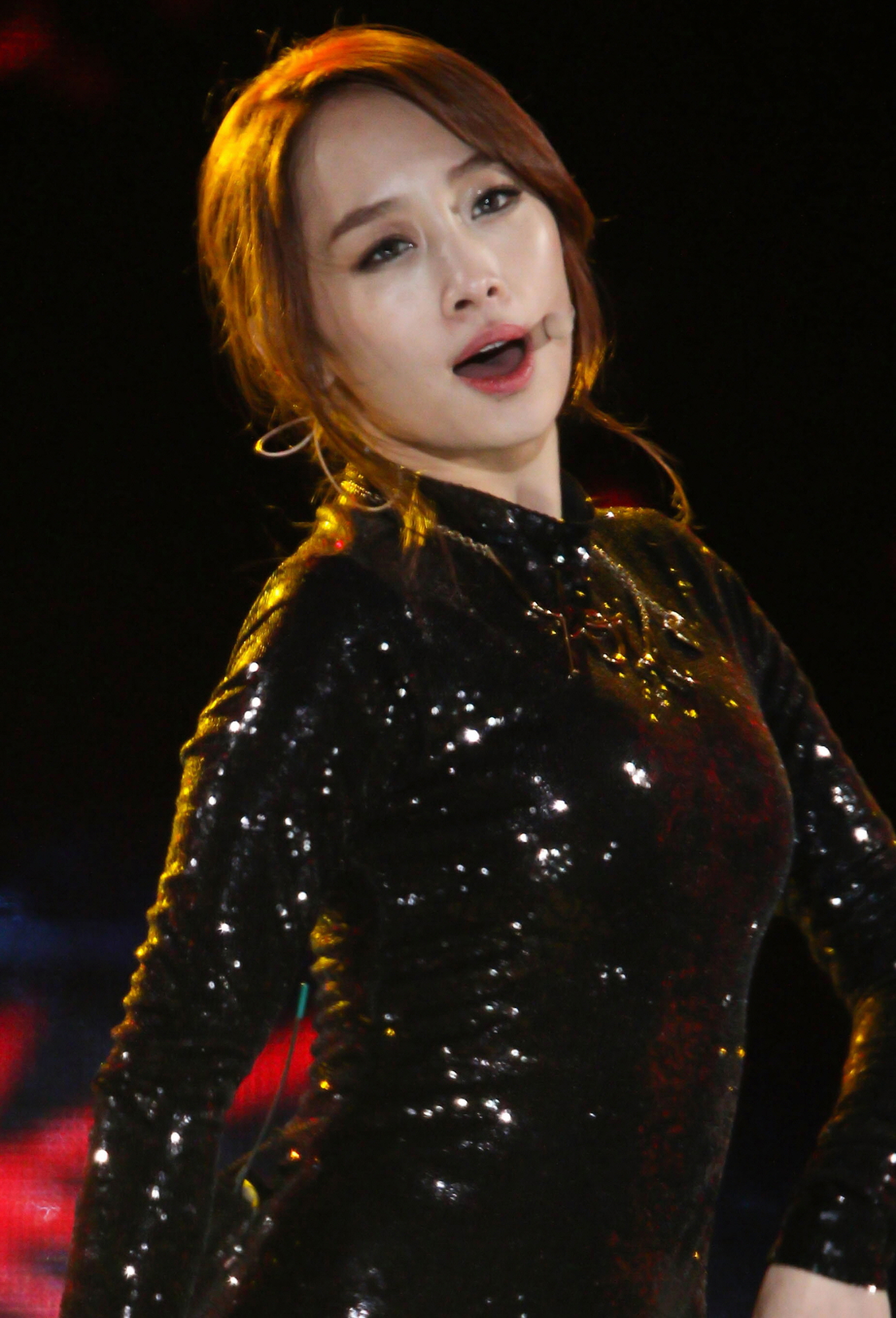 141211 니콜 더쇼 in 코엑스 야외무대